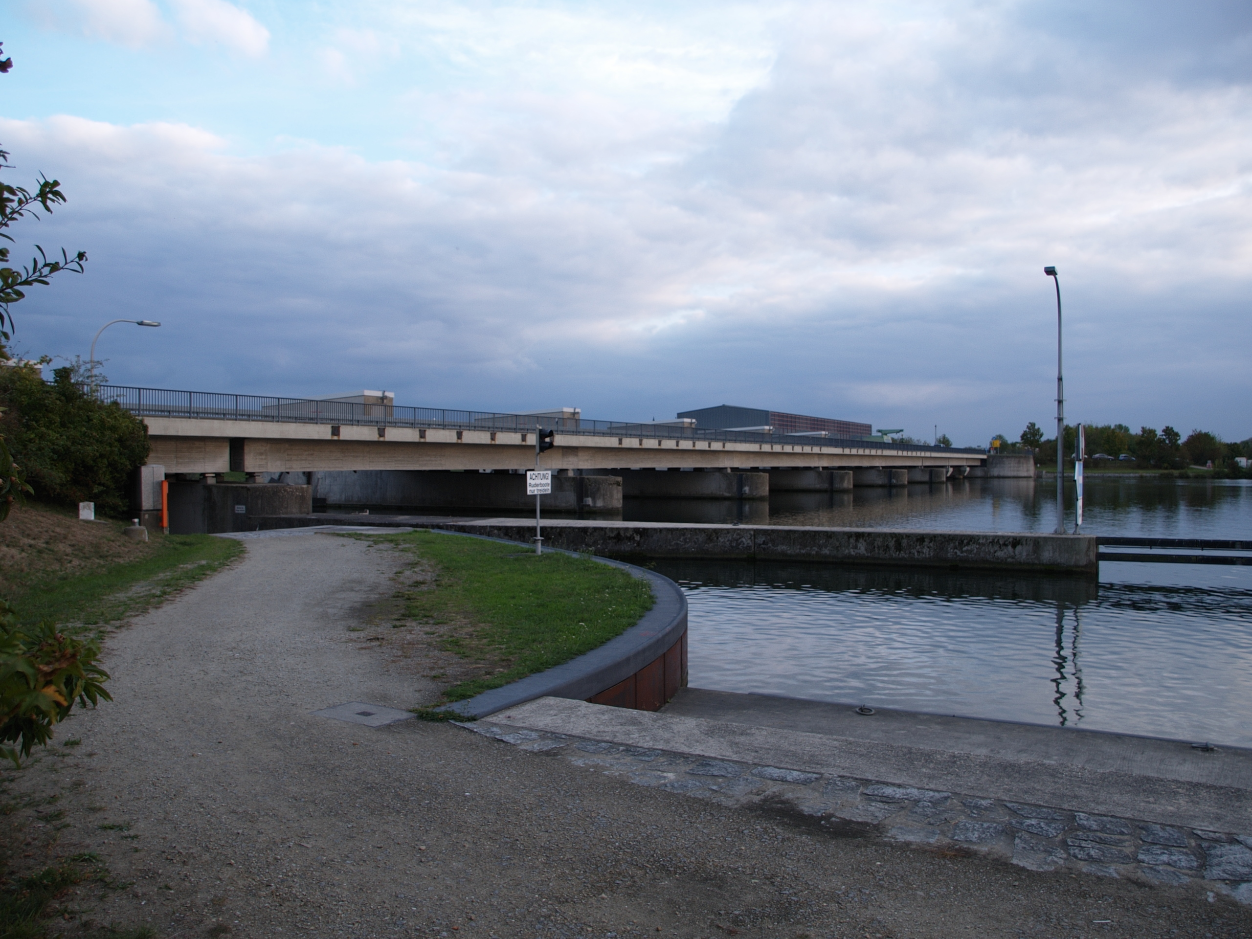 Kagerser Brücke von Westen gesehen